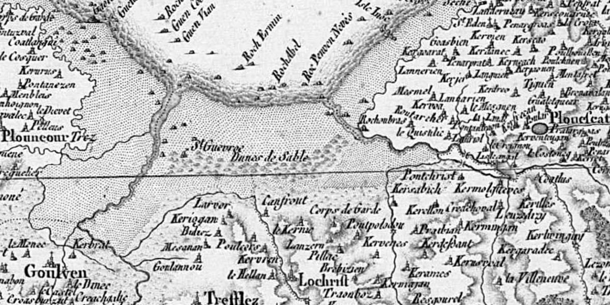 Carte de Cassini de l'Anse de Kernic et la Baie de Goulven avant les aménagements entrepris notamment par Louis Rousseau au XIXe siècle